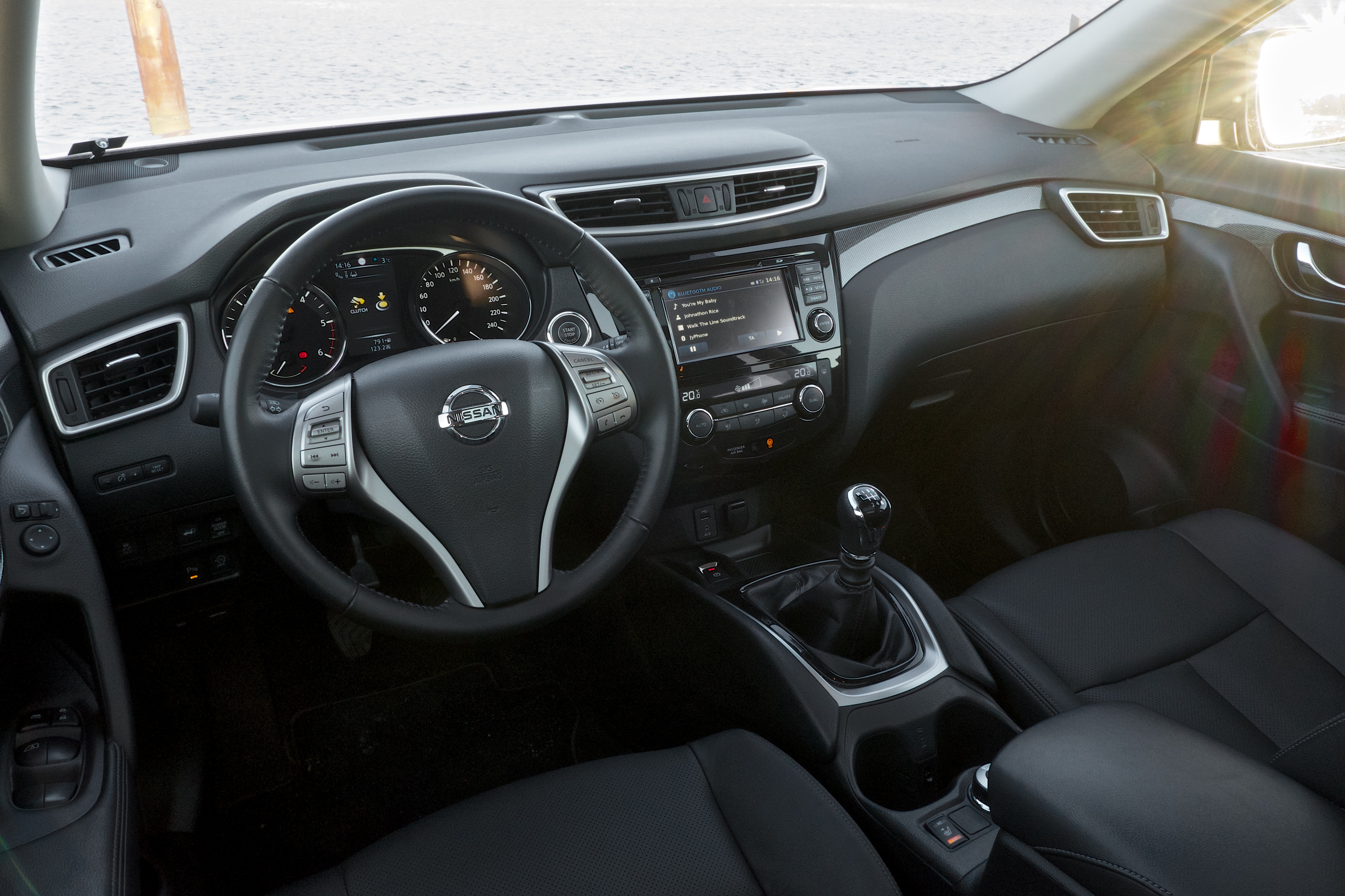 Nissan X-trail 2014